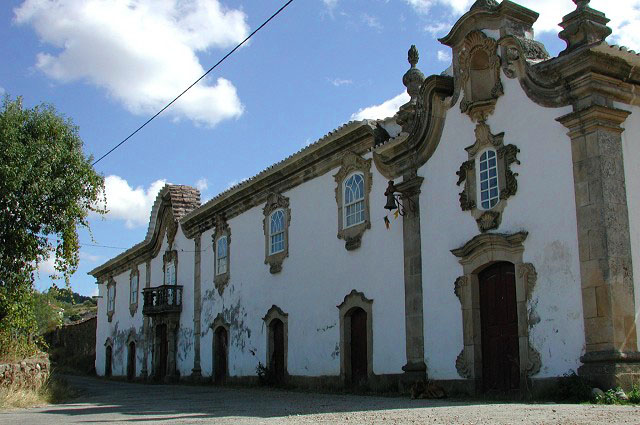 Solar dos Cancelos